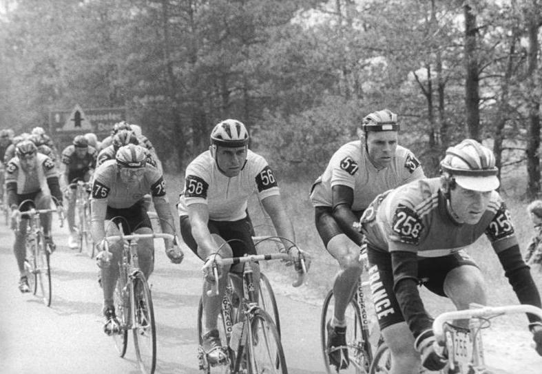 Friedensfahrt, Fahrerfeld ADN-ZB Kasper 20.5.87 Polen: 40. Internationale Friedensfahrt-11. Etappe von Karpacz nach Legnica über 160 km-Das Fahrerfeld nach dem Buffet beim Rennkilometer 120. Von rechts: Pascal Lance (Frankreich), der Träger des Gelben Trikots Uwe Ampler, der Träger des Weißen Trikots Uwe Raab (beide DDR) und Wasilli Shdarow (UdSSR).